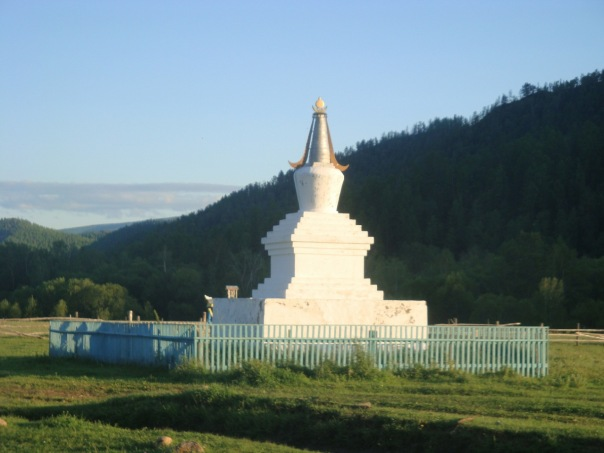 Субурган в улусе Улекчин